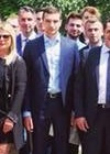 Les membres de Génération Nation à Strasbourg